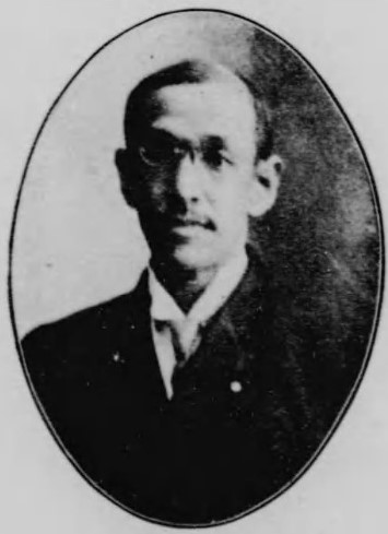 京極高備子爵（1873～1933）